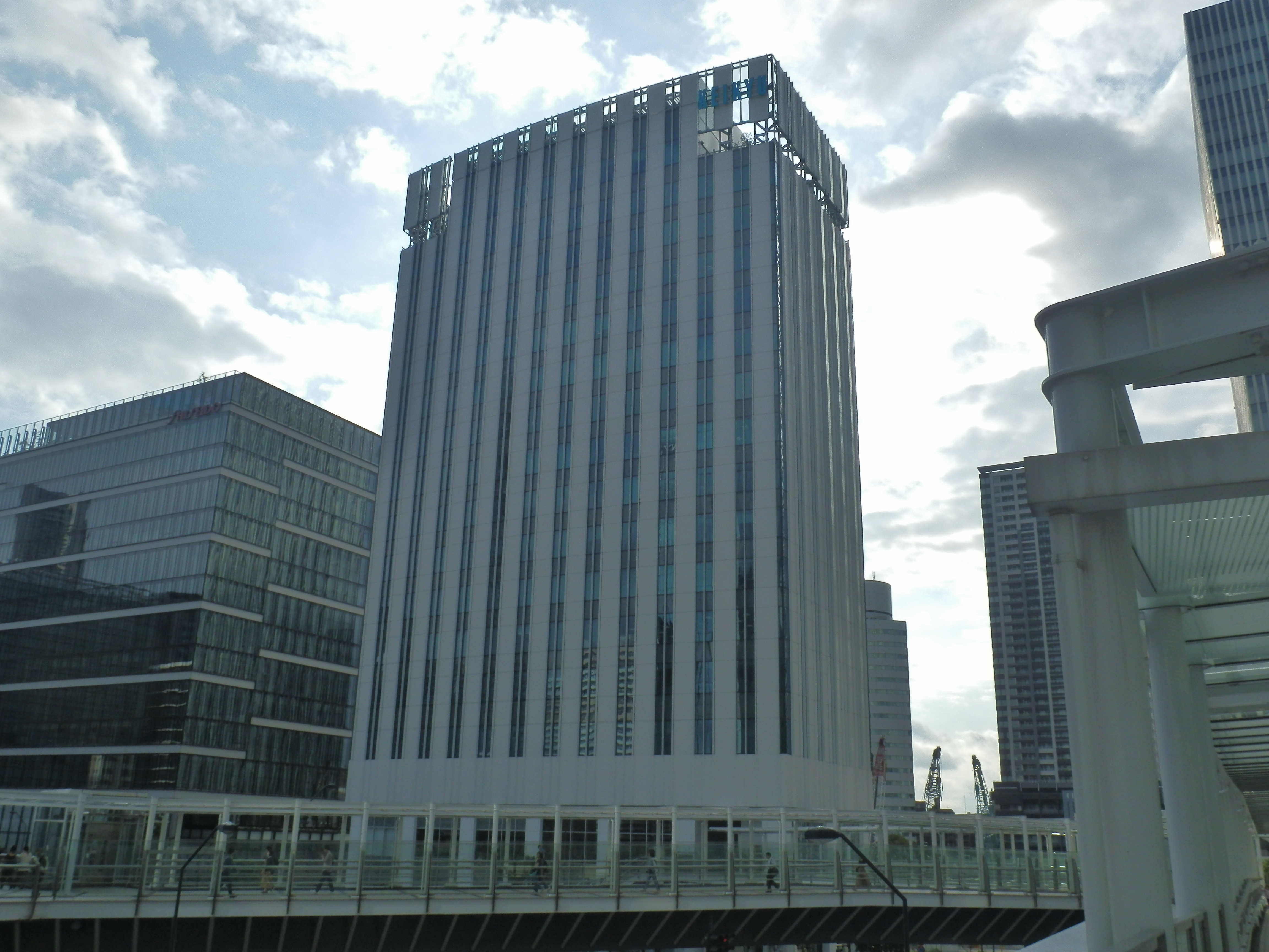 京急グループ本社